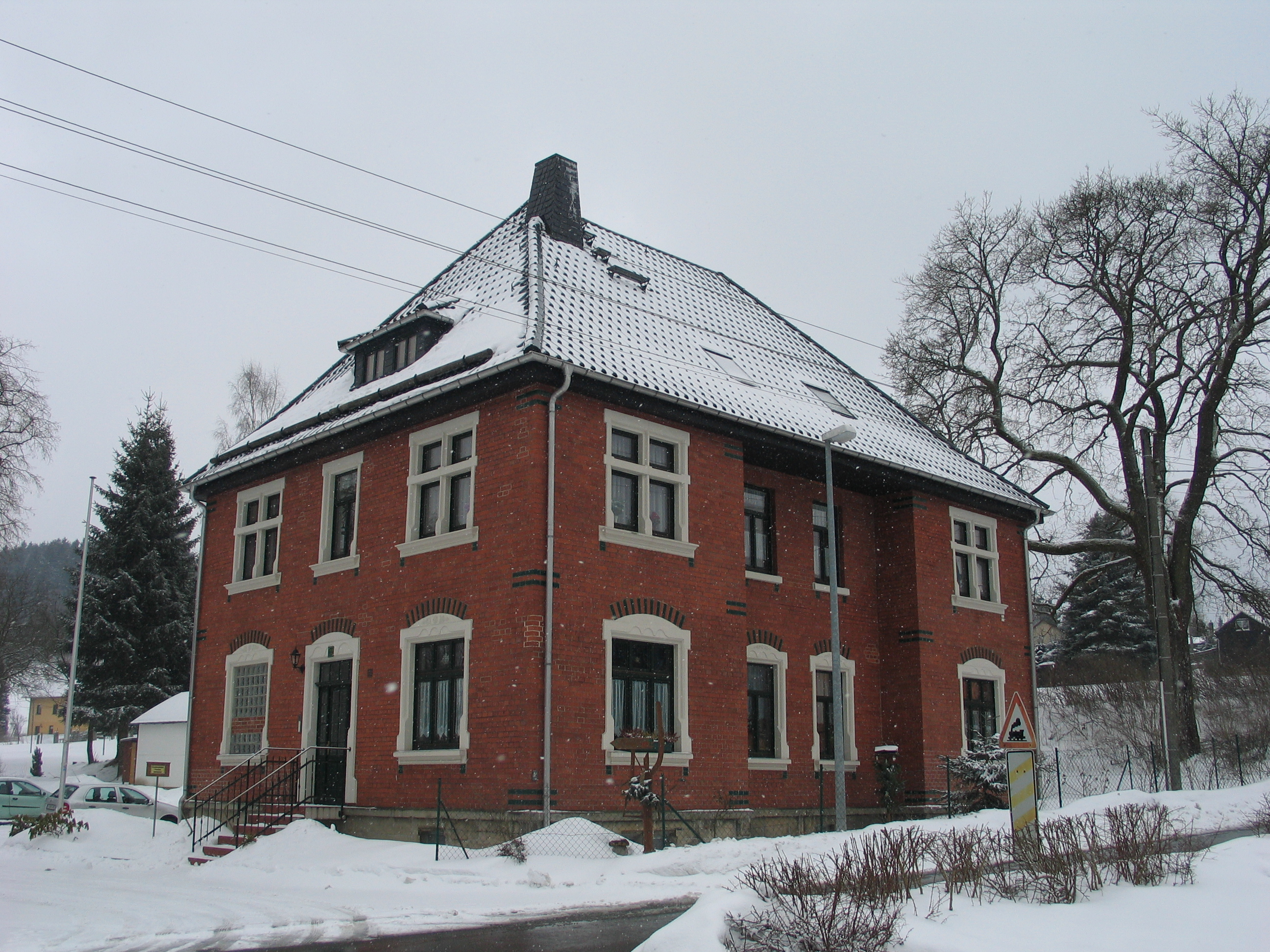 This is a photograph of an architectural monument.It is on the list of cultural monuments of Schönheide Neuheide, Ortsteil von Schönheide im Erzgebirge: Wohnhaus Neuheider Straße 22, besonders im Dachgeschoss umgebaute ehemalige Gaststätte „Waldschlößchen“. Das sächsische Landesamt für Denkmalschutz stuft das Gebäude als Kulturdenkmal ein mit dieser Begründung: Ehemaliges Gasthaus (heute Wohnhaus); von ortshistorischer Bedeutung. Es steht auf der Liste der Kulturdenkmale in Schönheide. Auf die Adreßseite einer Ansichtskarte mit dem Waldschlößchen aus der Zeit um 1920 ließ der Besitzer drucken: Garten-Restaurant Waldschlößchen (Besitzer Ernst Schlesinger) mit Gondelteich, Kegelbahn und Gesellschaftssaal. Neuheide bei Schönheide im Erzgebirge am Fuße des Kuhbergs – Idyllischer Ausflugsort. Fernruf Schönheide Nr. 324.